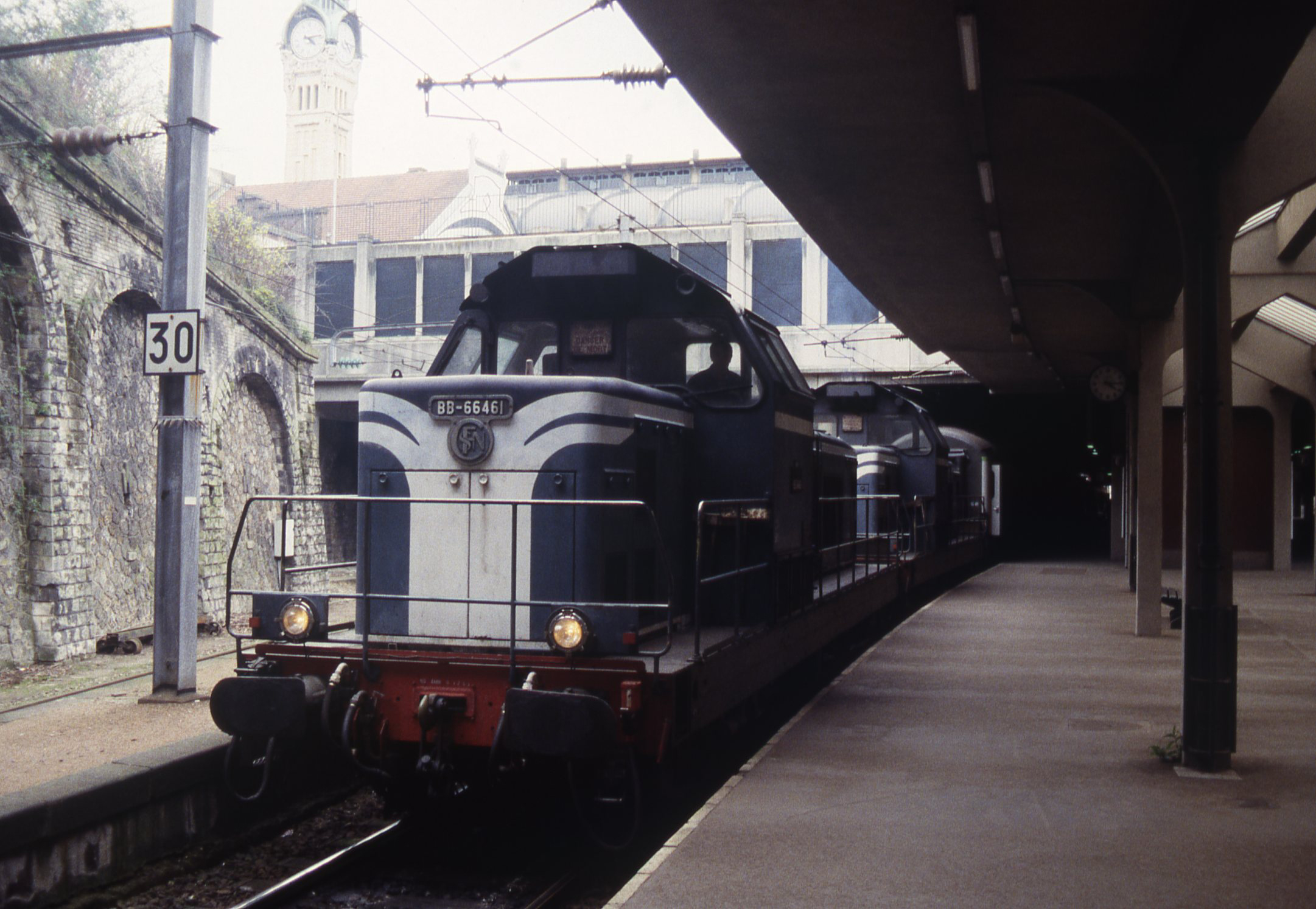 Langeafstandstrein naar Rennes